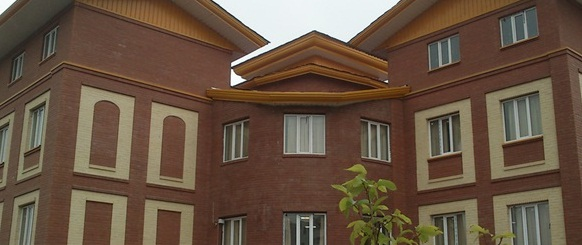 نمای مدرسه شهید باهنر 3